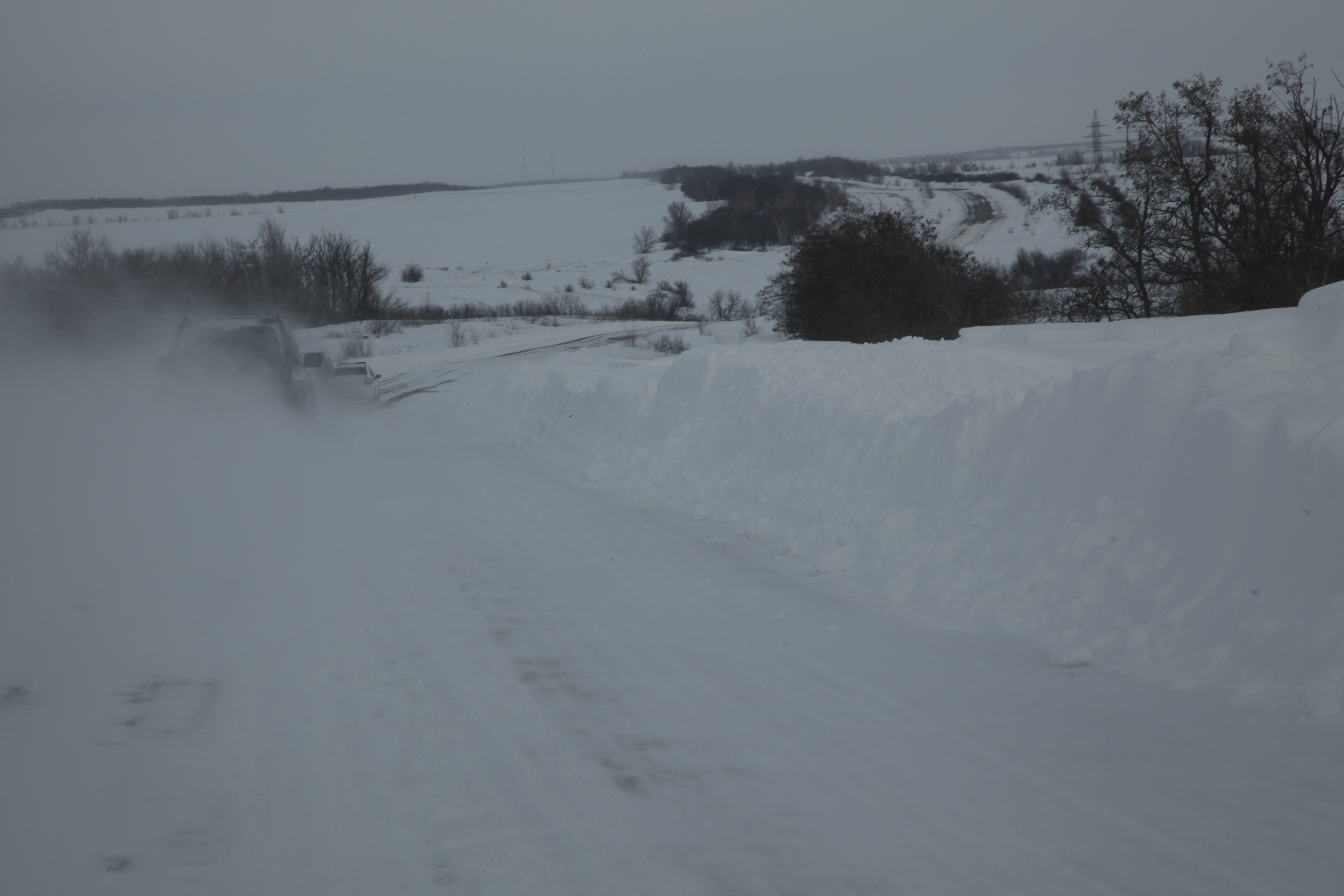 Дороги в заволжской части Волгоградской области в январе-феврале 2012 года.